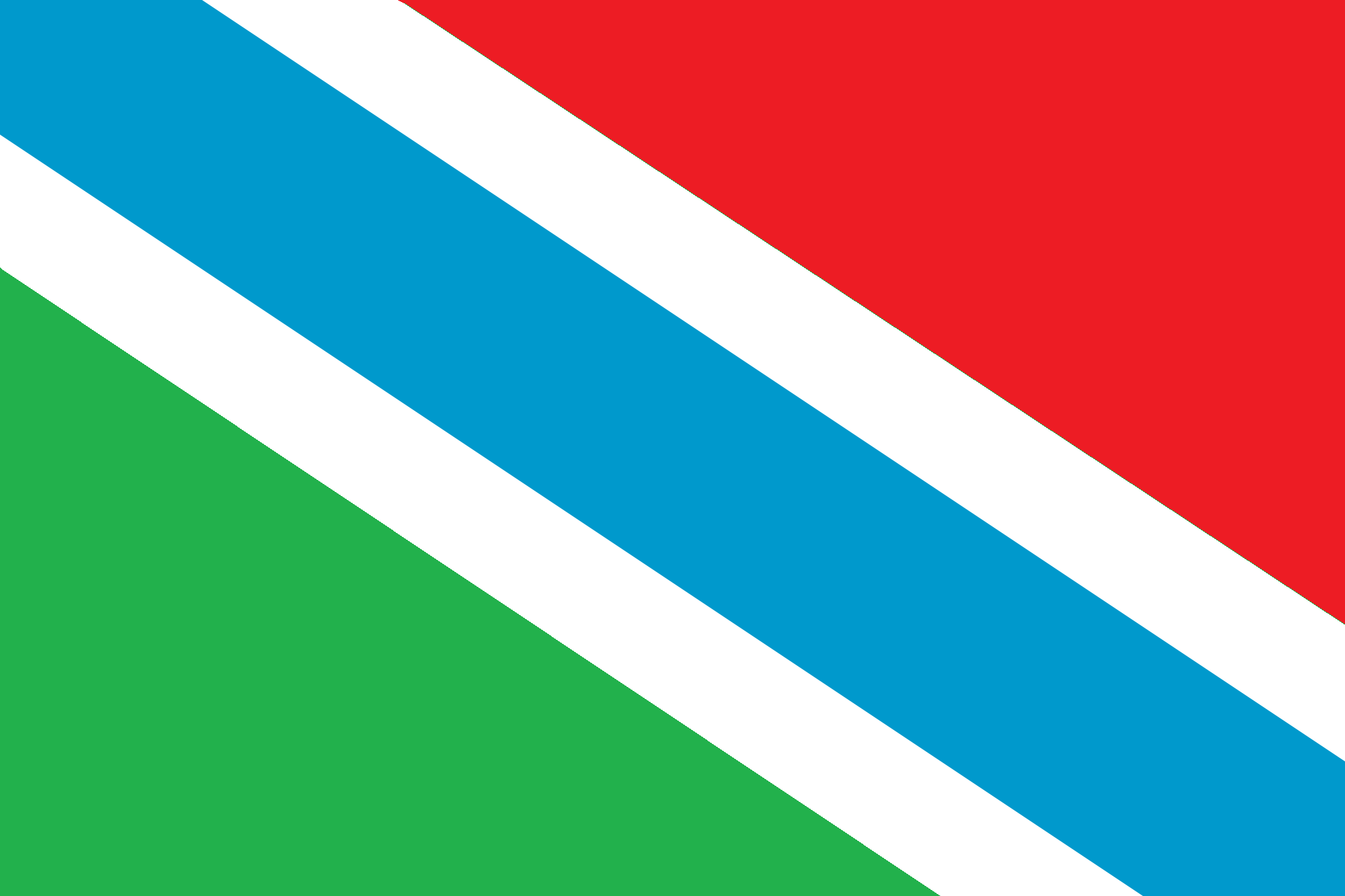 Bandeira Val de Xálima